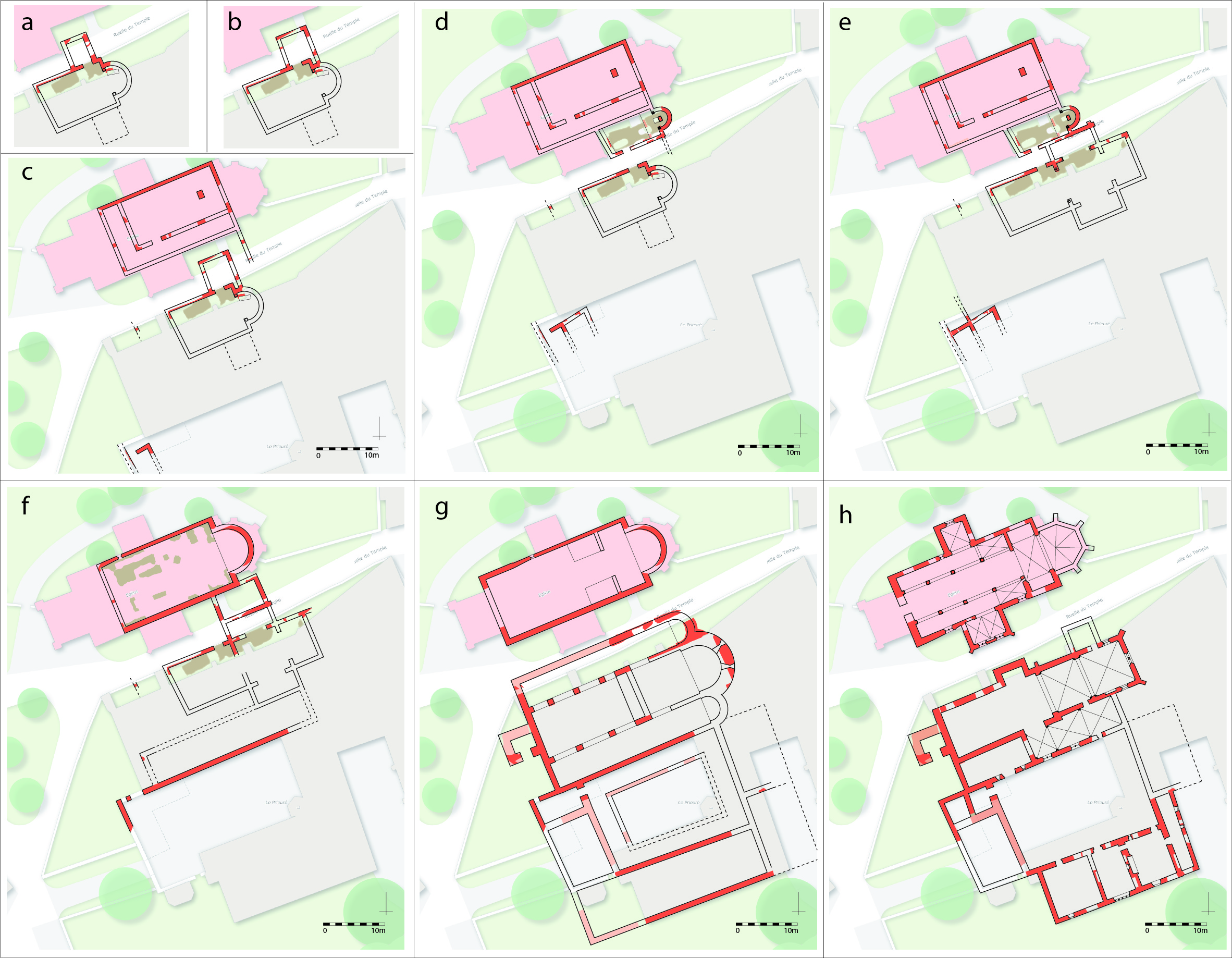 Môtiers, plans restitués des états successifs des bâtiments du prieuré Saint-Pierre, dessin Christian de Reynier